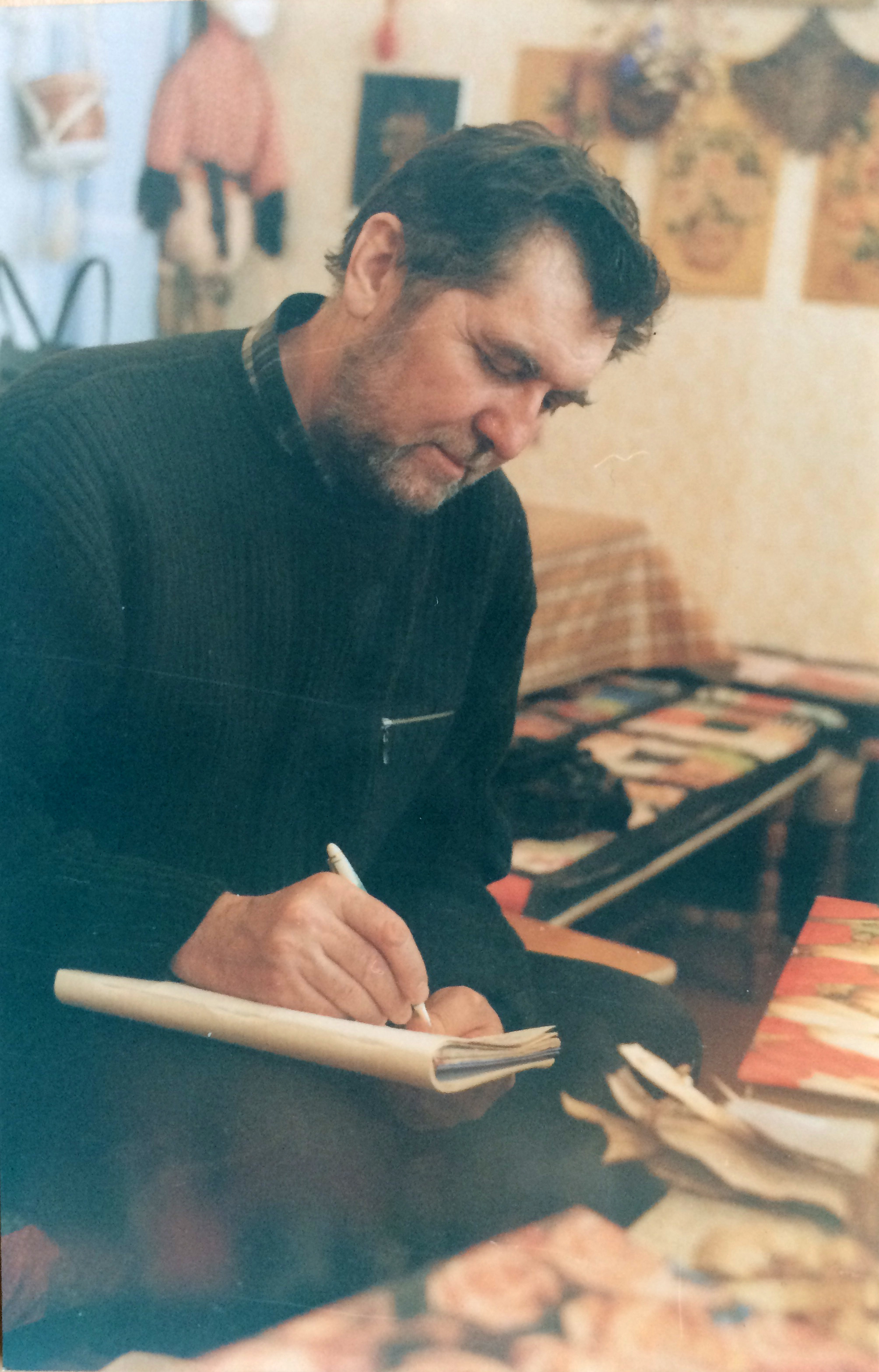 В мастерской у стола